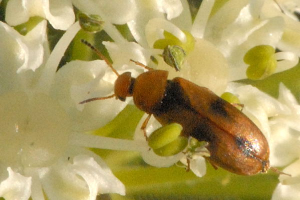 Anaspis melanopa from Commanster, Belgian High Ardennes .